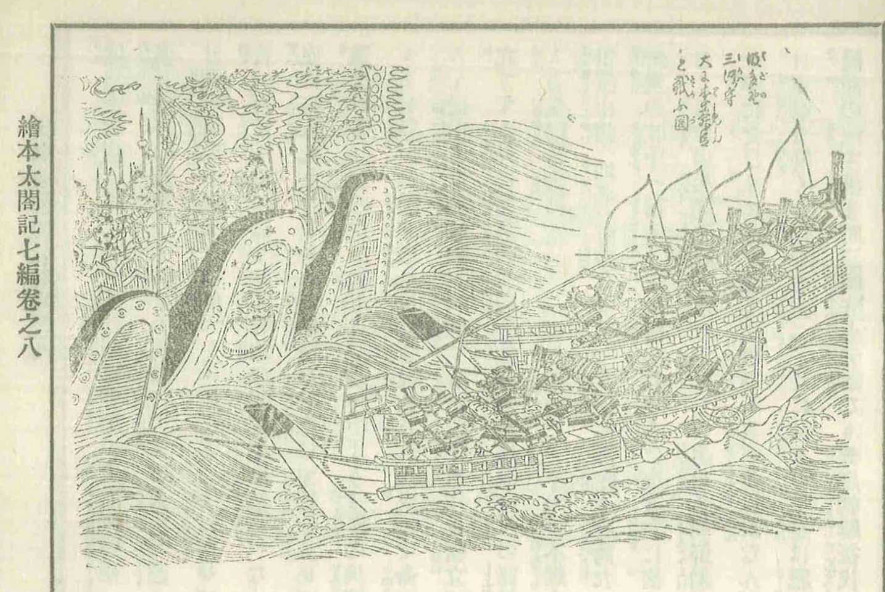 조선수군이 좁은목에 배를 대었는데 뱃머리를 나란히 잇대어 배사이의 간격을 없앴다. 이것은 성벽효과를 주기 위함이다. 울돌목(진도대교)에서는 불가능한 작전이다.